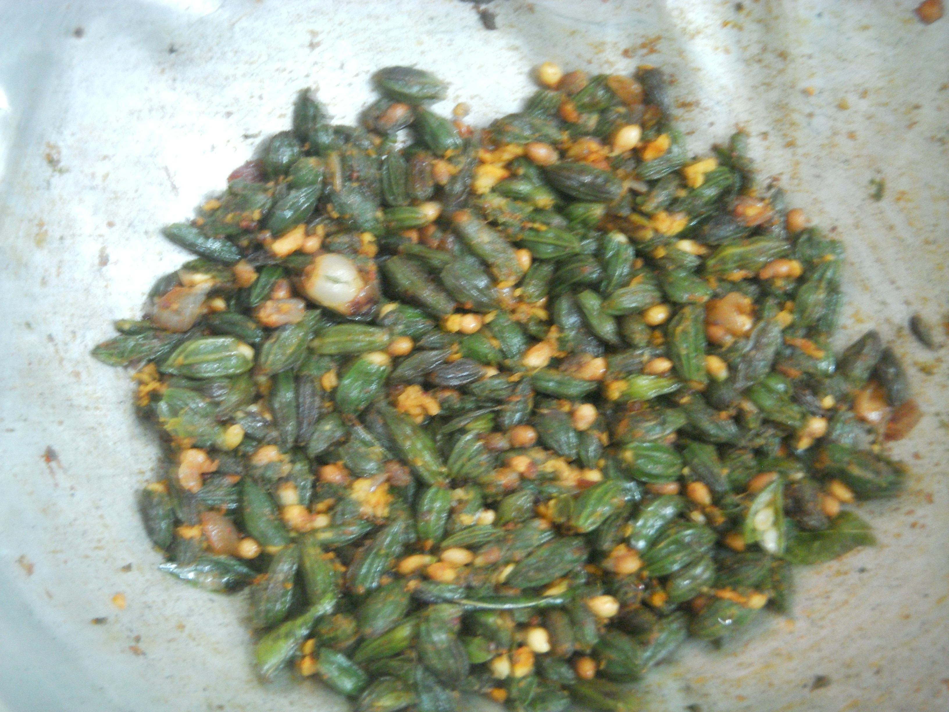 அதலைக்காய் பொரியல்